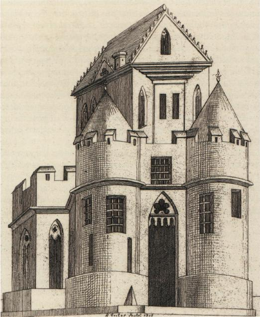 Restitution imaginaire de la cathédrale de Reims au temps de Nicaise. Gravure de Leclerc